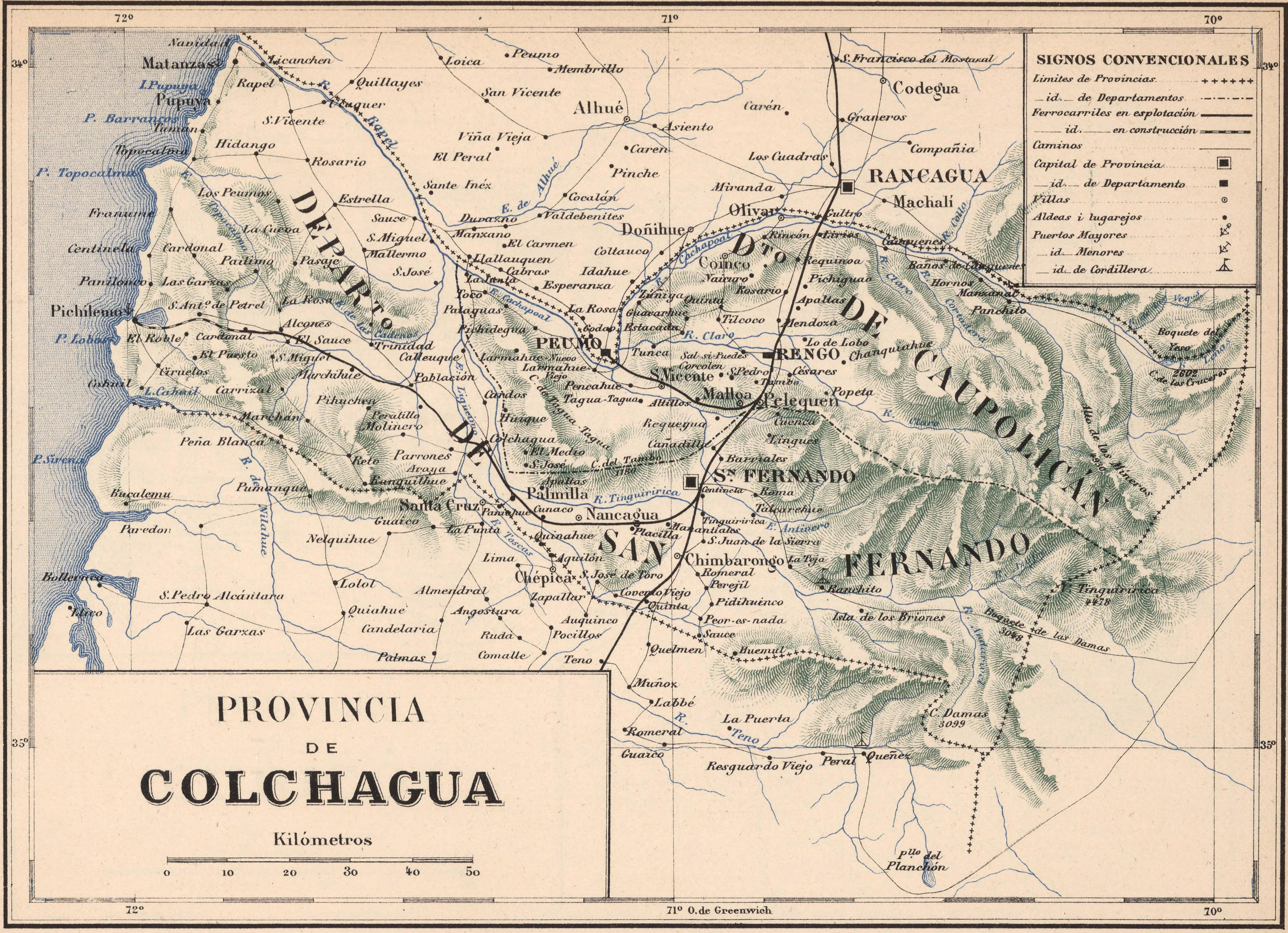 Atlas de Chile Arreglado para la Jeografia Descriptiva de la Republica de Chile por Enrique Espinoza.